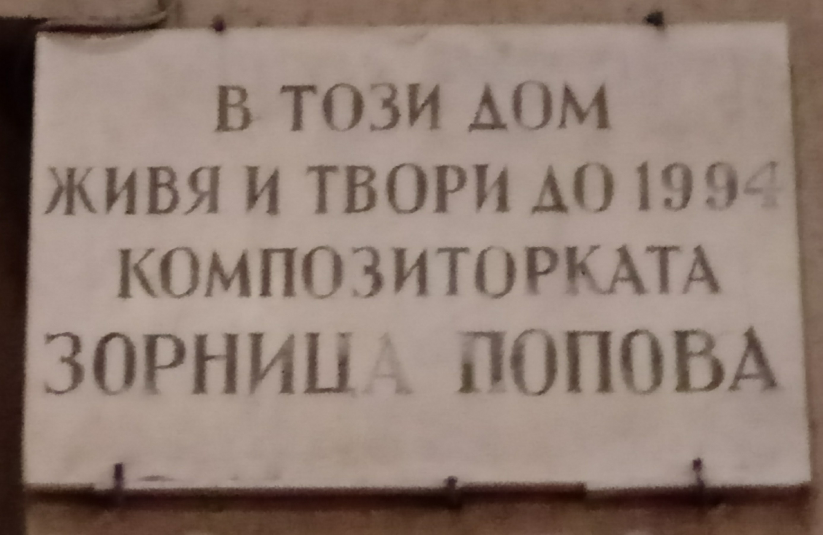 Zornitsa Popova memorial plaque, 25 Tsarigradsko Chaussee, Sofia